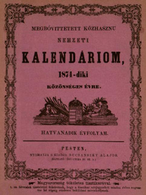 Megbővített közhasznu nemzeti kalendáriom, 1874-diki közönséges évre